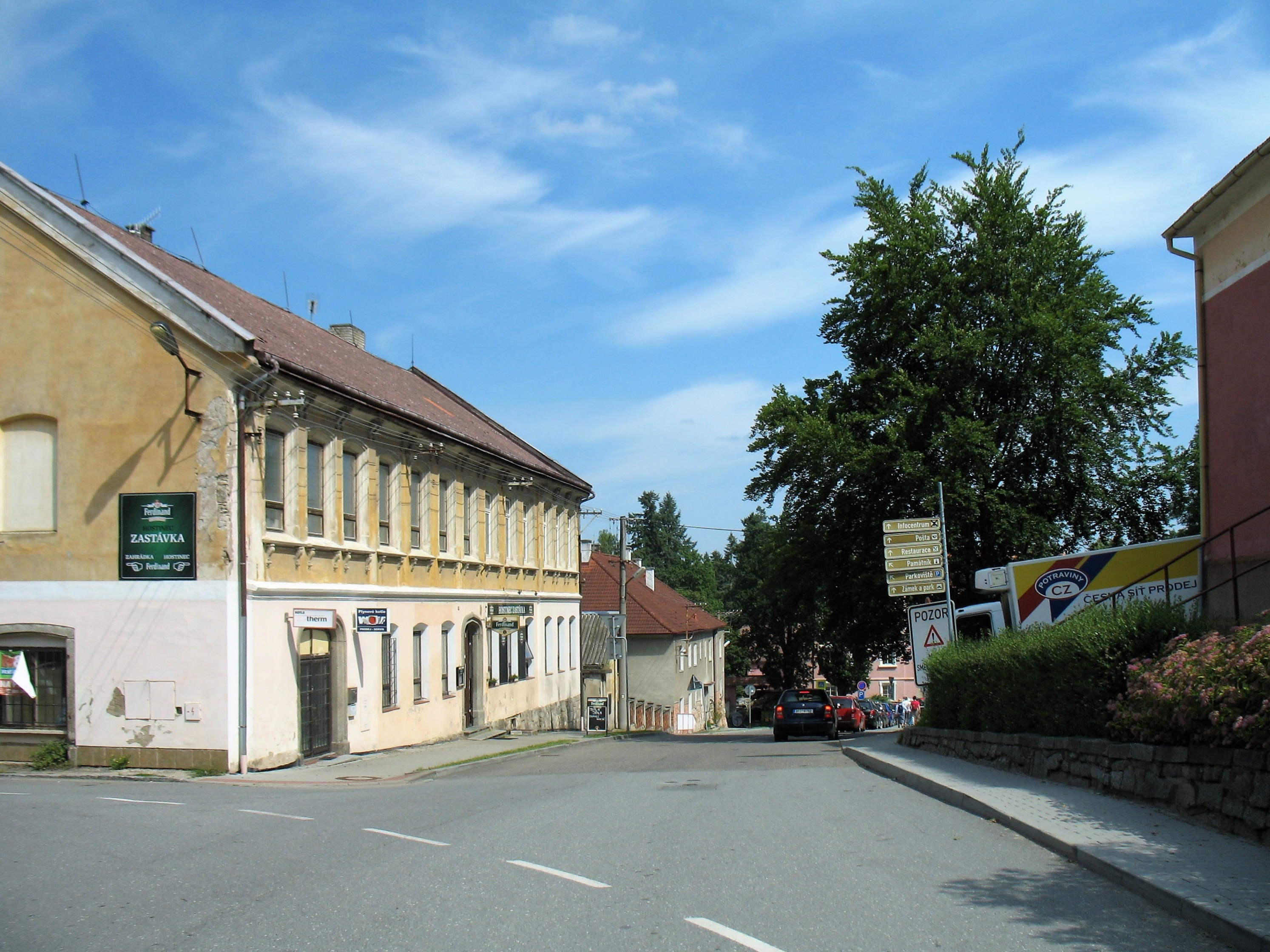 Vrchotovy Janovice, ulice poblíž kostela sv. Martina